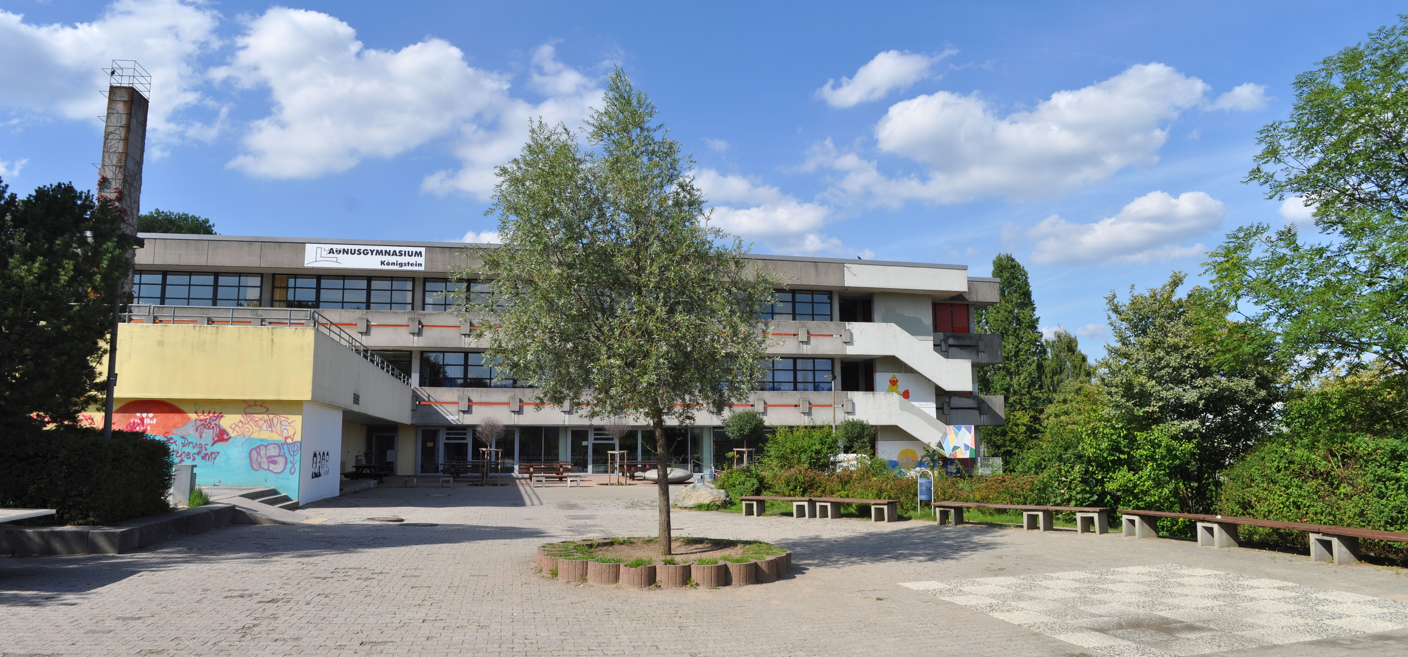 Taunusgymnasium in Königstein vom Schulhof aus fotografiert. Ds Bild ist aus drei Einzelbildern zusammengesetzt. Der Schriftzug Taunus-Gymnasium zeigt noch Reste des Abi-Streichs 2011 (Überkleben des T und u in Taunus)